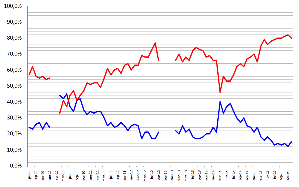 Porcentajes de aprobación (línea azul) y rechazo (línea roja) del Senado de Chile. Información encuesta Adimark ( desde julio de 2009 en adelante.